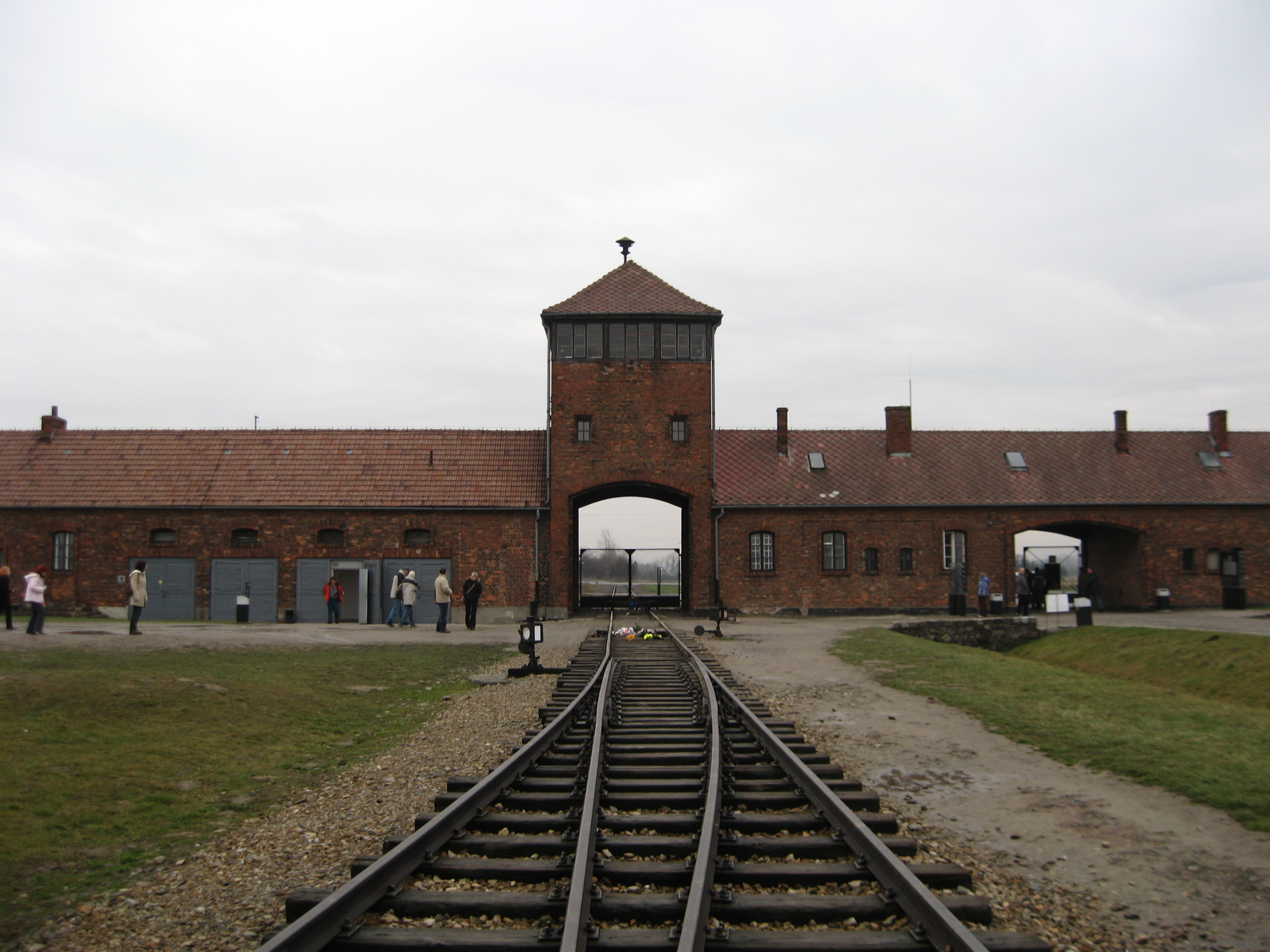 Tako imenovana "vrata smrti" , kjer je potekala selekcija prispelih. 75% ljudi je bilo takoj poslanih v plinske celice.